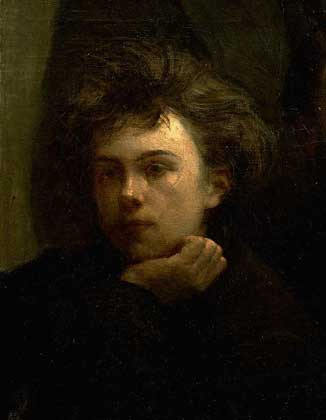 Артур Рембо: портрет